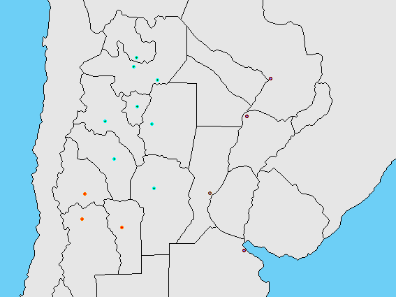 Mapa de las ciudades españolas fundadas en la Argentina y el Paraguay hasta el año 1600, con las principales postas. La ruta Buenos Aires - Córdoba se separa de la de Buenos Aires - San Luis en la posta de Bellville. Y se separa de BA - Rosario en Areco. El sistema de postas no estaba bien desarrollado en el 1600, pero está a fines ilustrativos. Modificación de File:Argentina_(Político).png